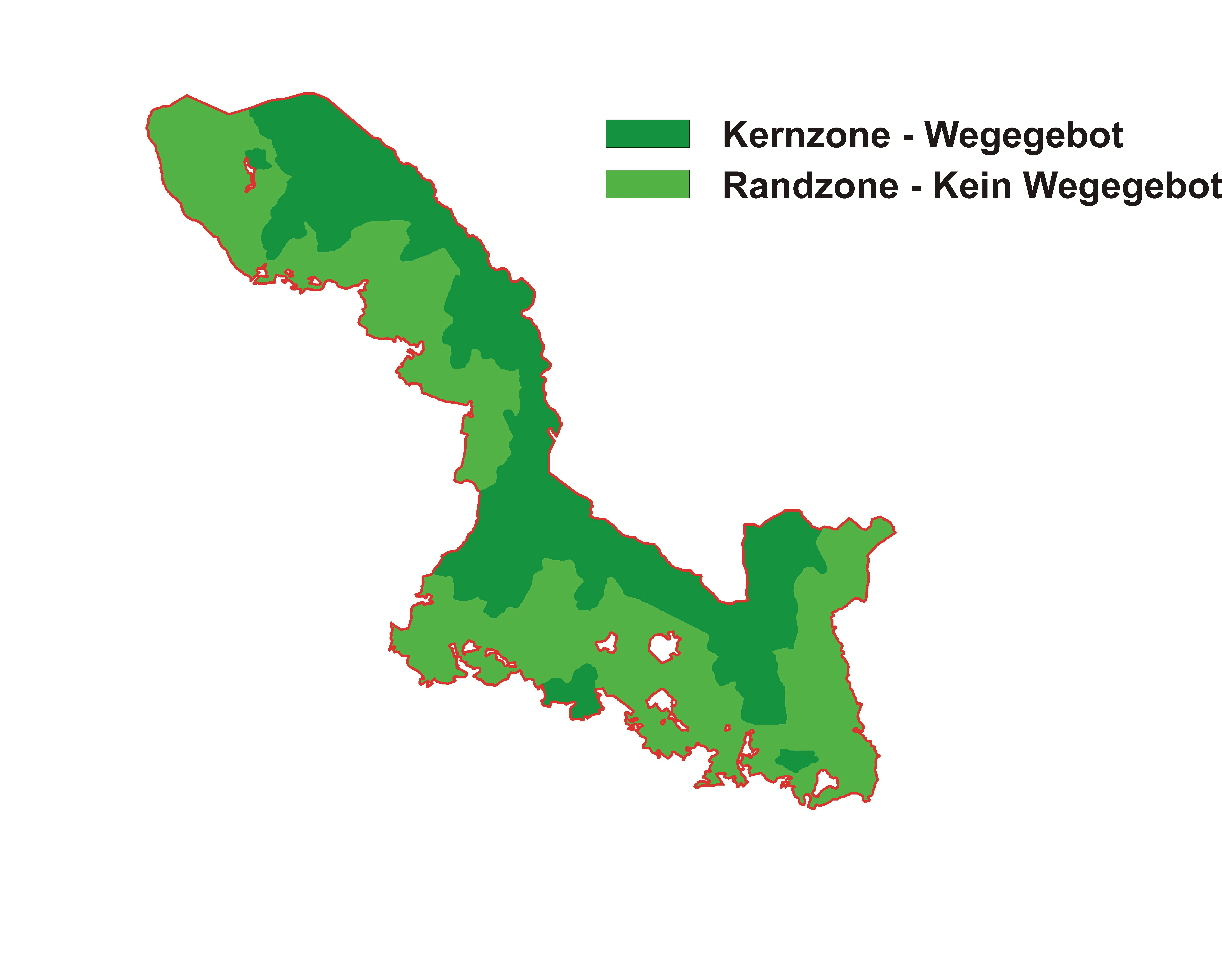 Nationalpark Bayerischer Wald, Kern- und Randzonen